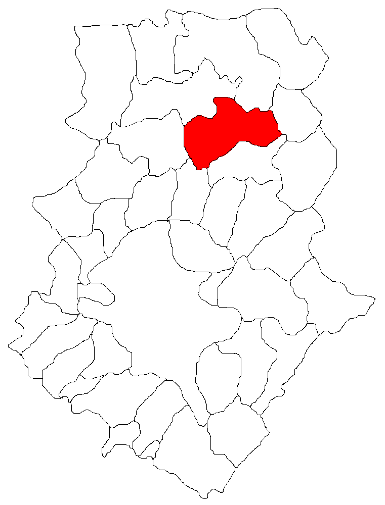 Categorie:Hărţi ale judeţului Ilfov